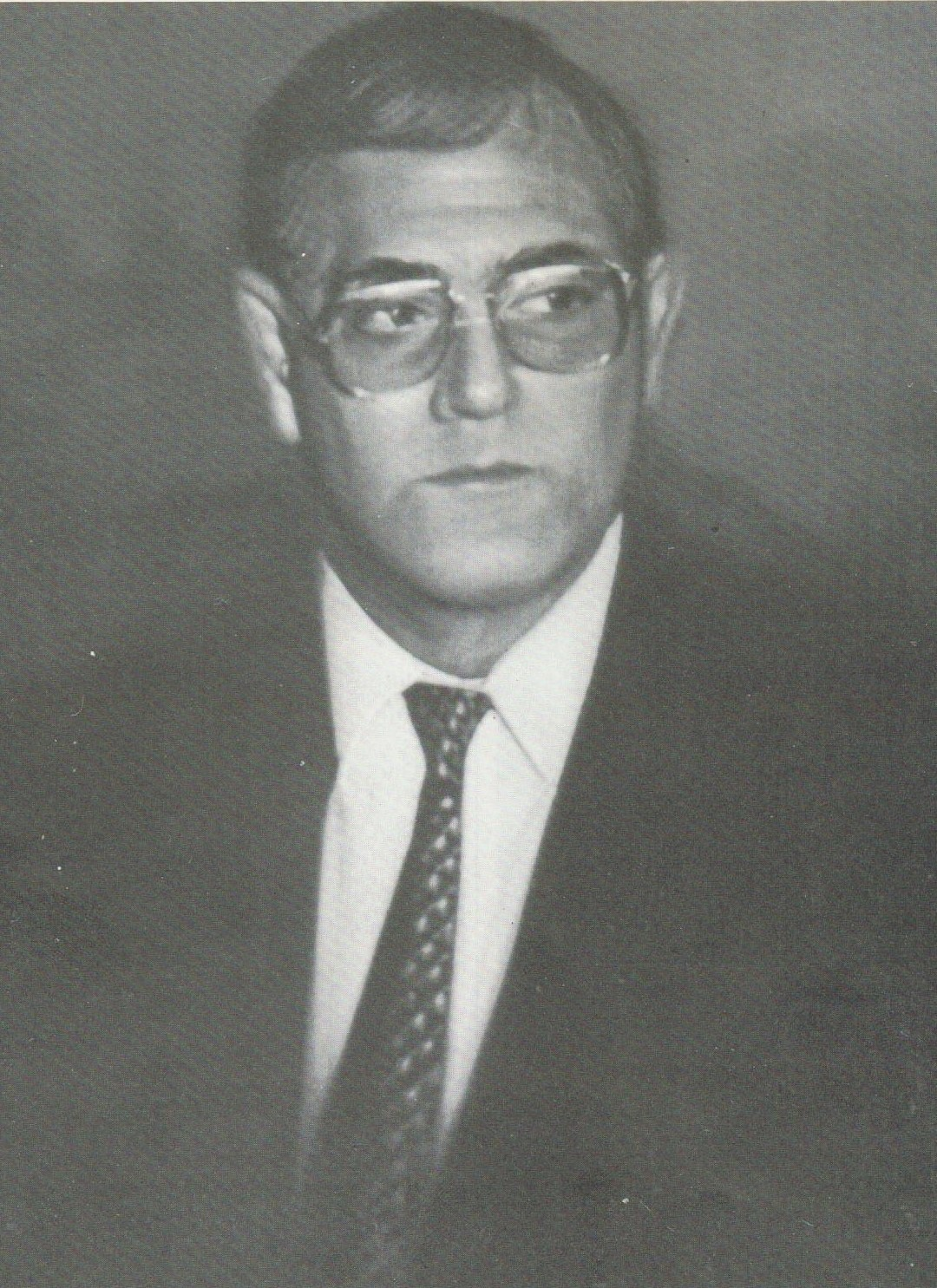 Retrato